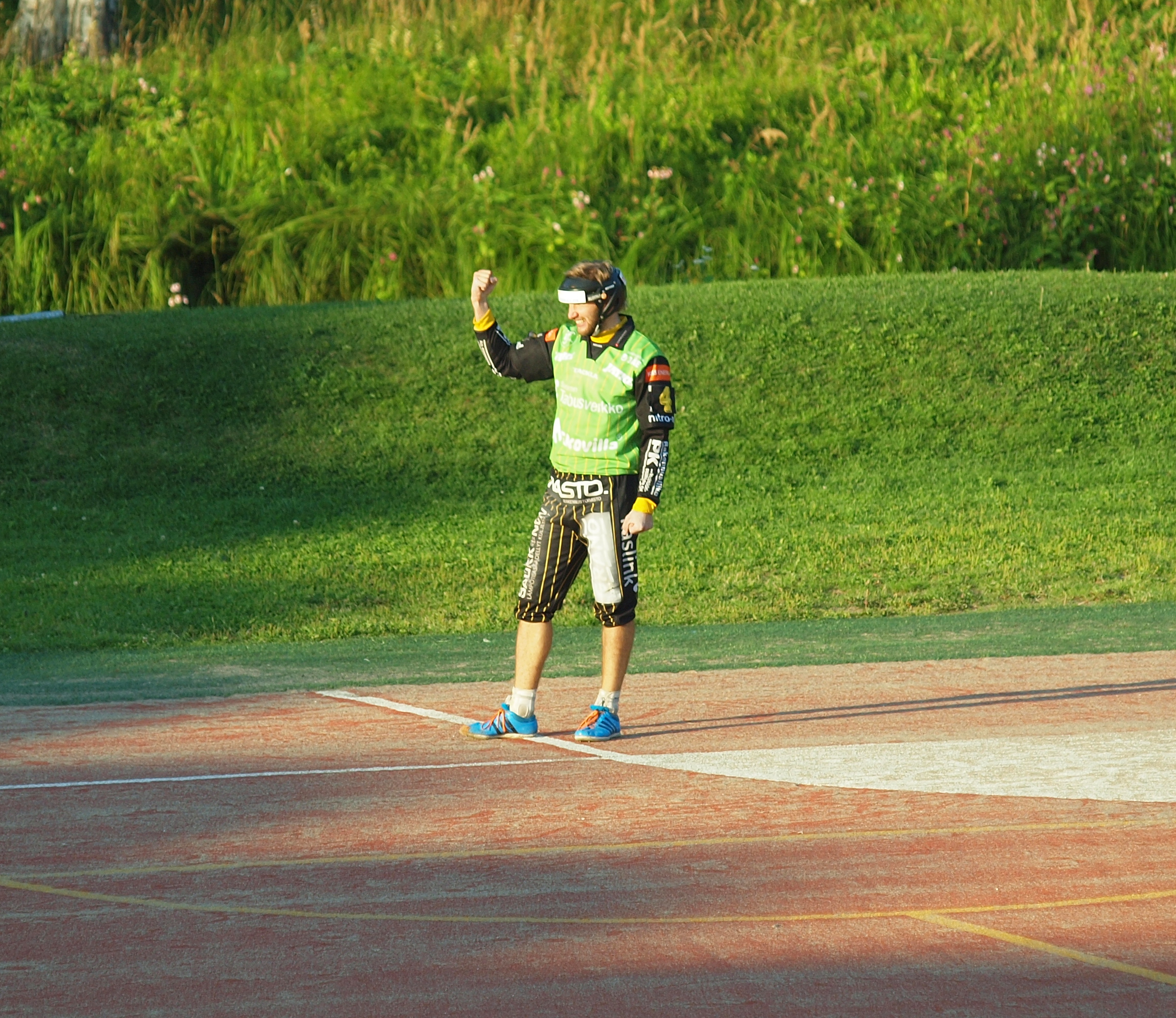 Vimpelin Veto - Kouvolan Pallonlyöjät pesäpallo-ottelu 5.8.2014. Kuvassa Juho Toivola.